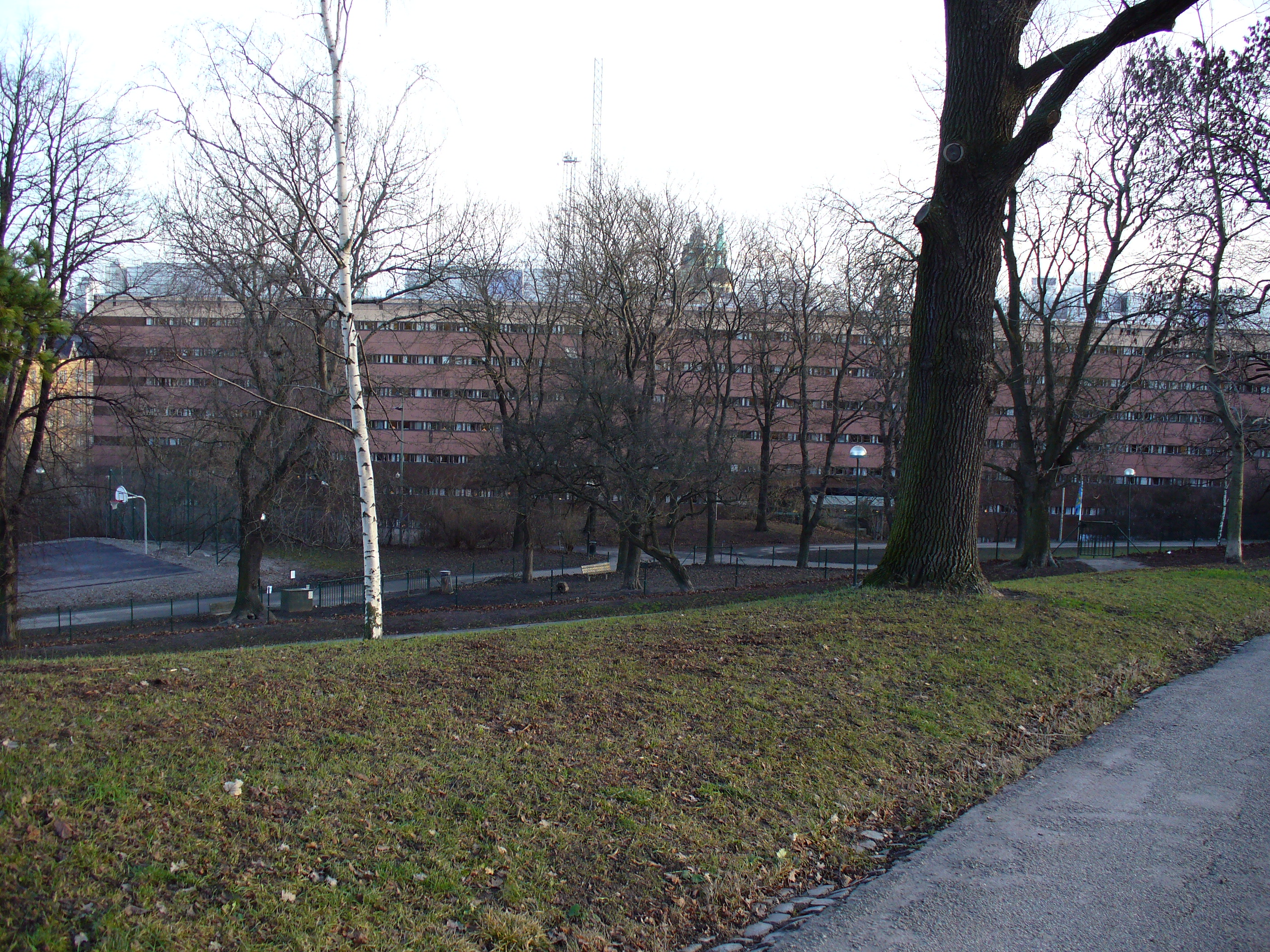 Kronobergshäktet on Kungsholmen, Stockholm, Sweden